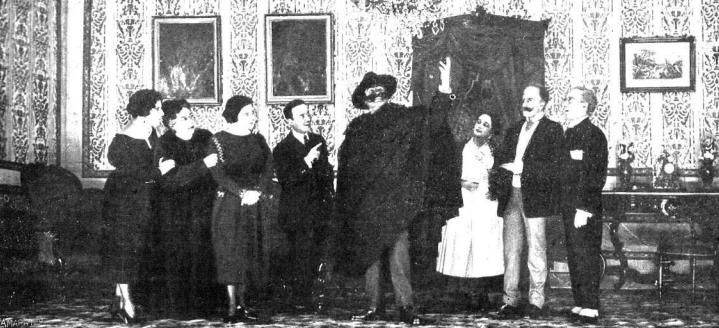 Escena del estreno de la obra de teatro Febrerillo, el loco, de los Hermanos Álvarez Quintero